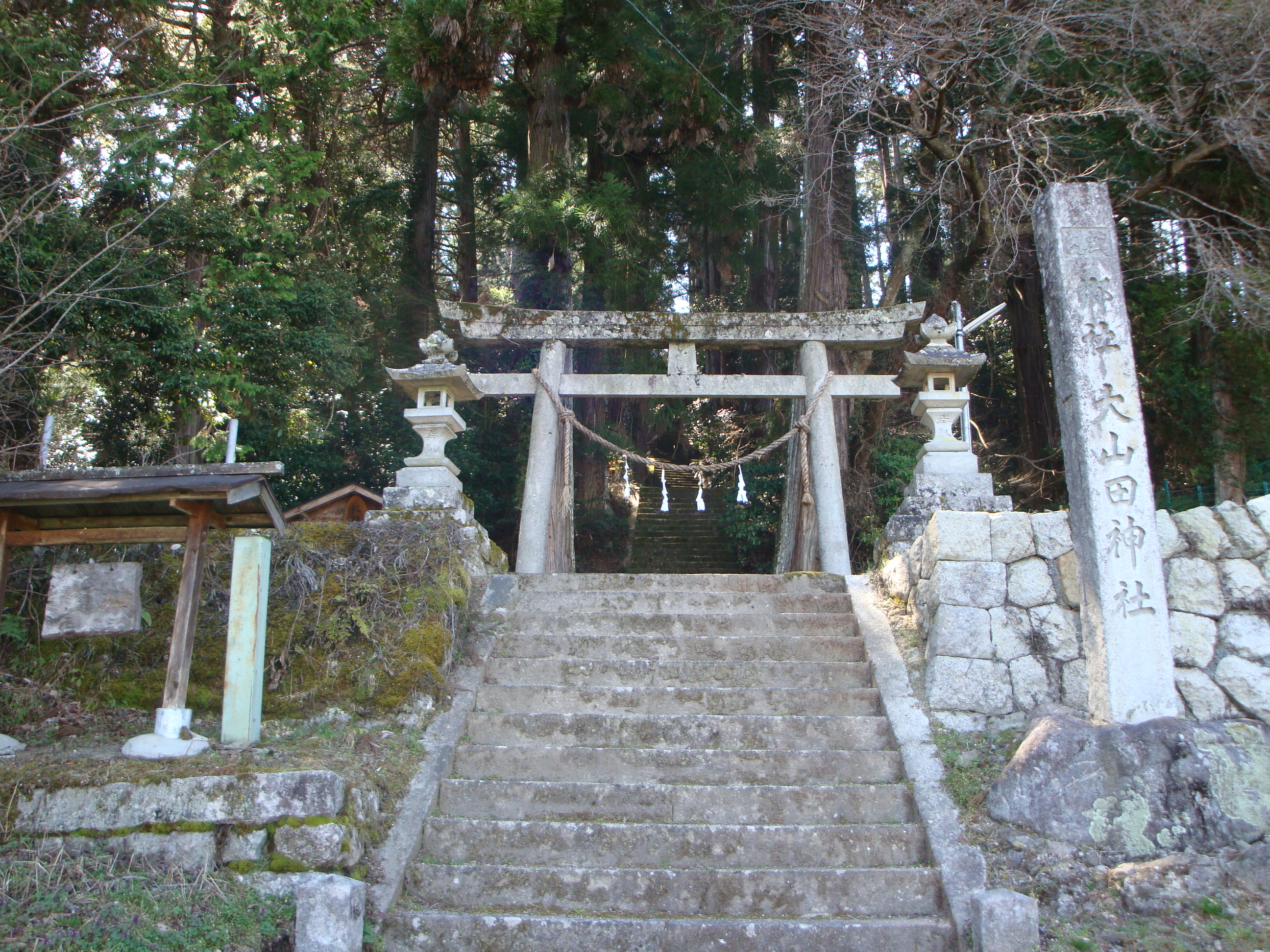 大山田神社 鳥居１と奥に続く長い石段